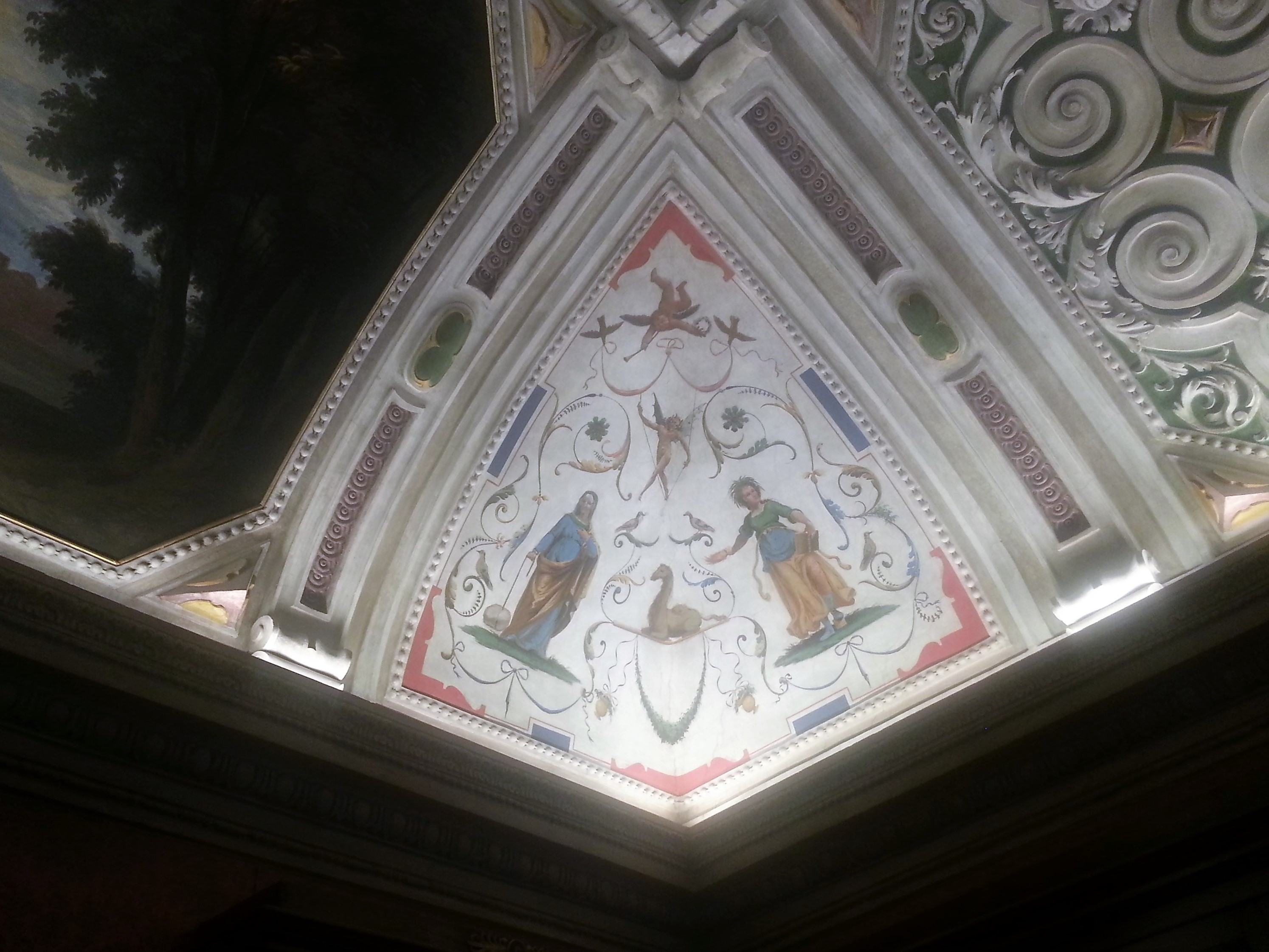 Affreschi di pietro Paschenis per la biblioteca Angelo Mai